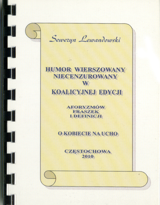 Humor wierszowany ... O kobiecie...